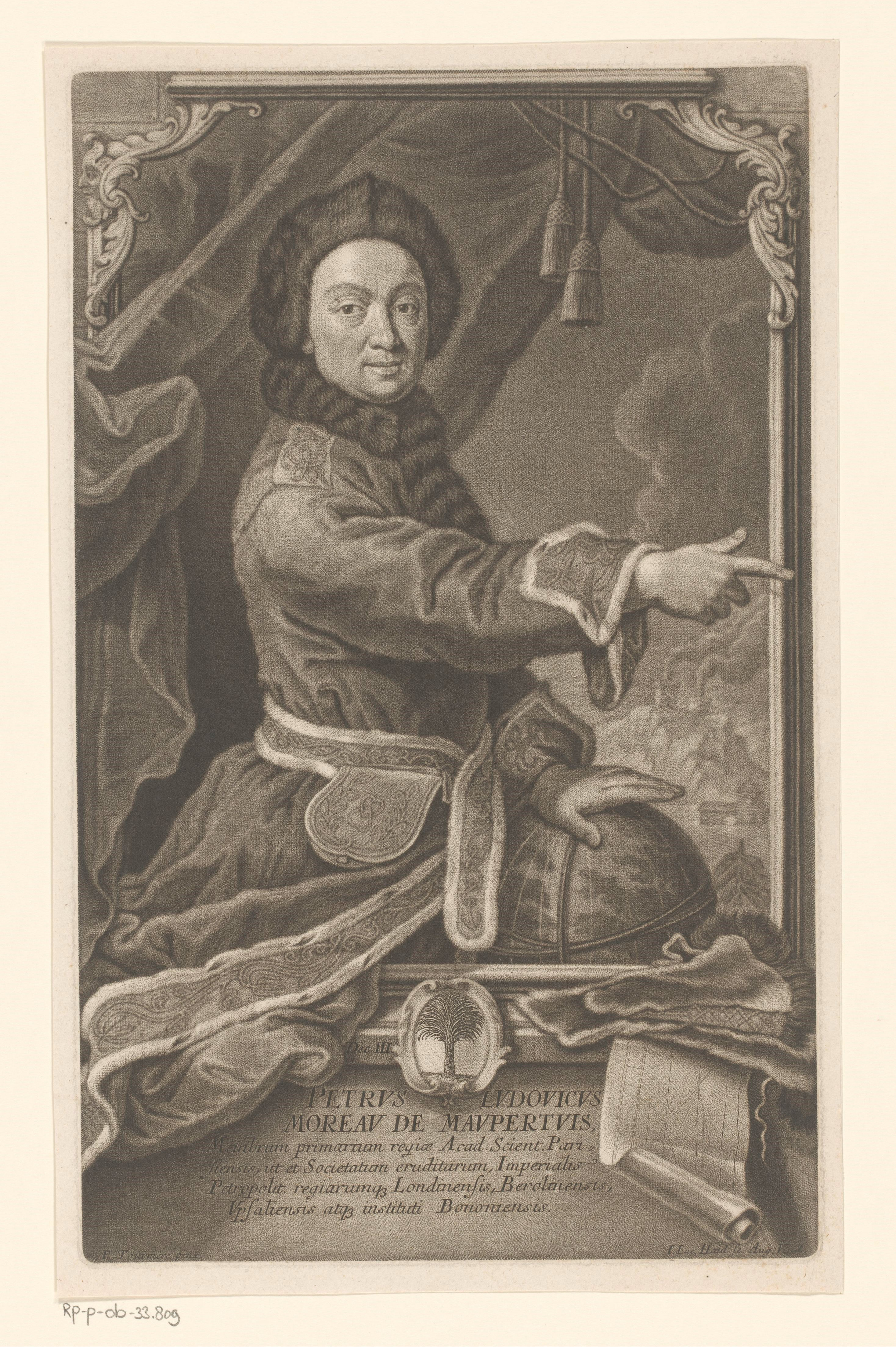 IdentificatieTitel(s): Portret van Pierre Louis MaupertuisObjecttype: prent Objectnummer: RP-P-OB-33.809Catalogusreferentie: HAB A 13643Opschriften / Merken: verzamelaarsmerk, verso, gestempeld: Lugt 2228opschrift, verso linksonder, handgeschreven in inkt: ‘C. [deT]erberk’, Naam.VervaardigingVervaardiger: prentmaker: Johann Jacob Haid (vermeld op object)naar schilderij van: Robert Tournières (vermeld op object)Plaats vervaardiging: AugsburgDatering: 1744Materiaal: papier Techniek: mezzotint / etsenAfmetingen: plaatrand: h 310 mm × b 192 mmToelichtingPrent gebruikt voor: Brucker, Jacob. Bildersal heutiges Tages lebender und durch Gelahrheit berühmter Schrifftsteller. Augsburg: Johann Jacob Haid, 1744.OnderwerpWat: historical personsglobetrees: palm-treesmokeindex finger forwards, pointing, indicatingWie: Pierre Louis MaupertuisVerwerving en rechtenVerwerving: onbekend 2006Copyright: Publiek domein